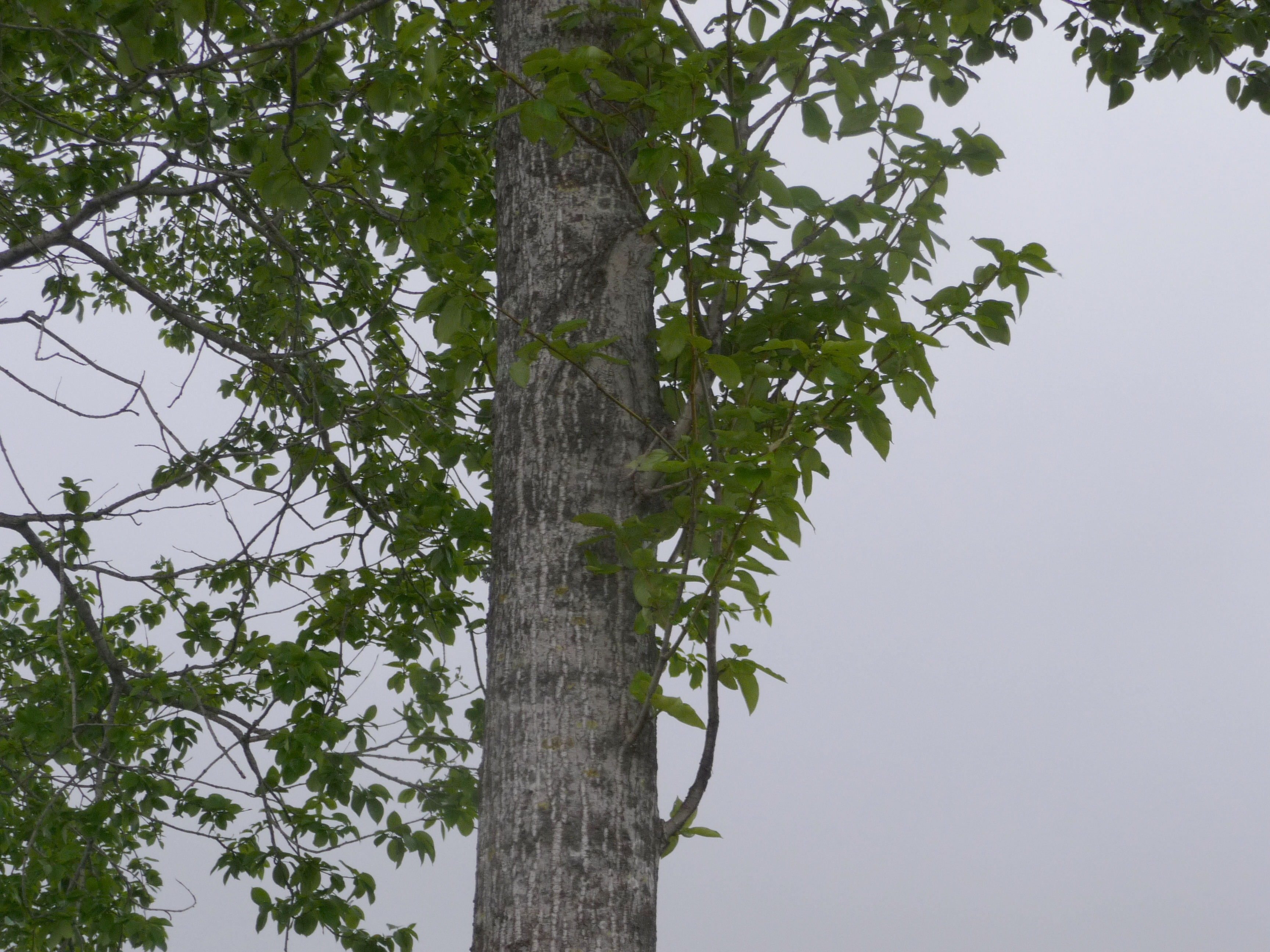 北海道弟子屈町に自生するヤマナラシ